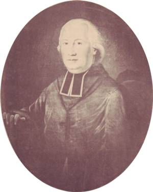 Portrait de Nicolas Francin, évêque constitutionnel de Moselle